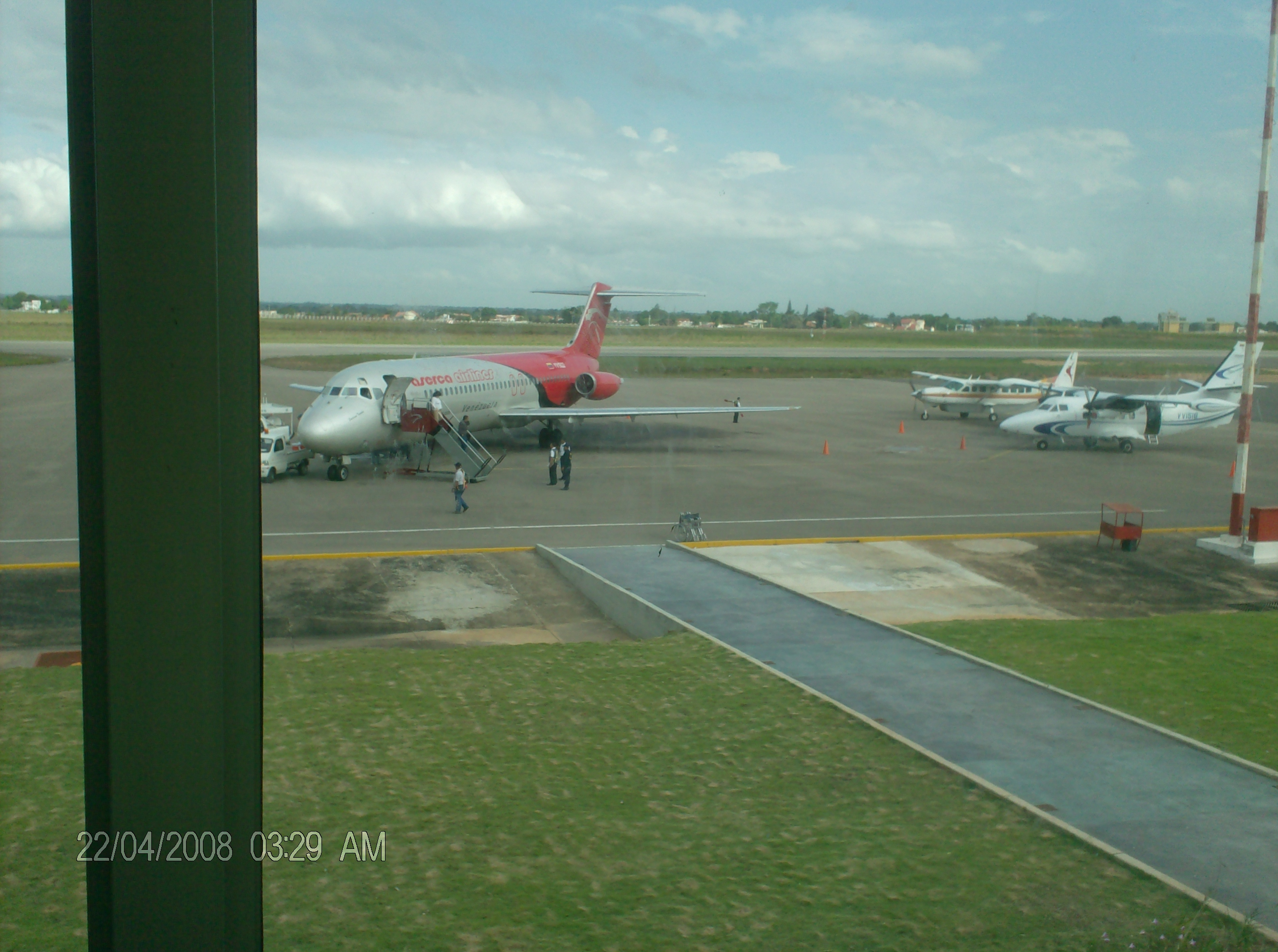 El Aeropuerto Internacional José Tadeo Monagas, es un aeropuerto venezolano ubicado en la ciudad de Maturin, Estado Monagas en el oriente venezolano. Su código IATA es MUN y su código OACI- ICAO es SVMT. Está ubicado entre el 4º y 5º puesto de los aeropuertos del país debido a su tráfico doméstico e internacional diversificado y de movimiento de carga. (From Spanish Wikipedia)